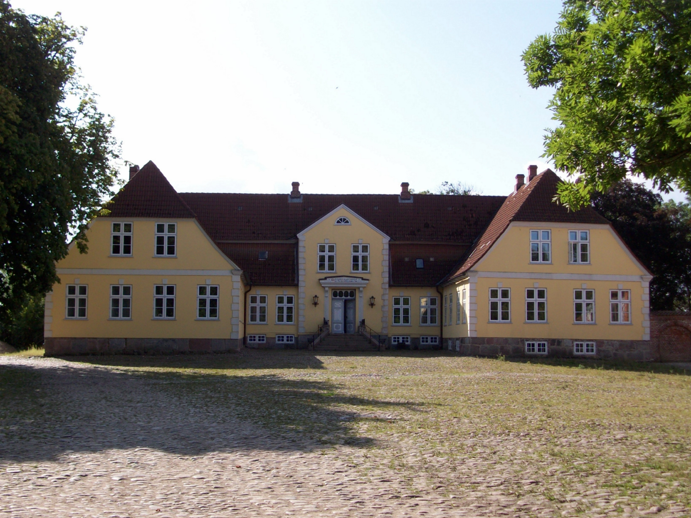 Gut Düttebüll Gemeinde Kroonsgaard